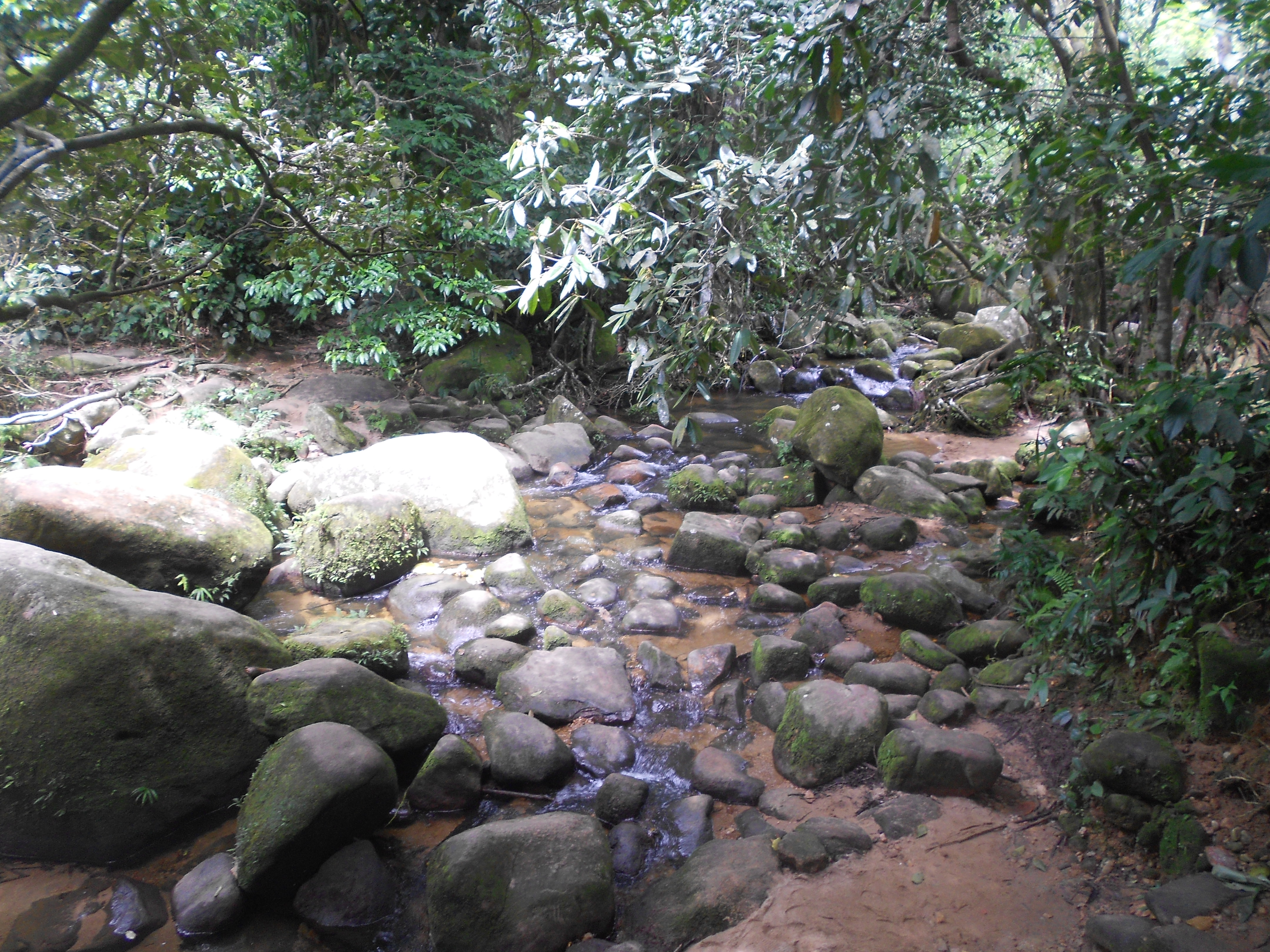 Riacho em Trindade, distrito de Paraty, estado do Rio de Janeiro, Brasil.